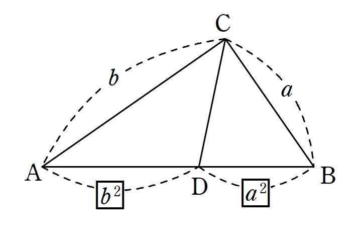 ピタゴラスの定理に依存しないピタゴラスの定理の逆の証明法